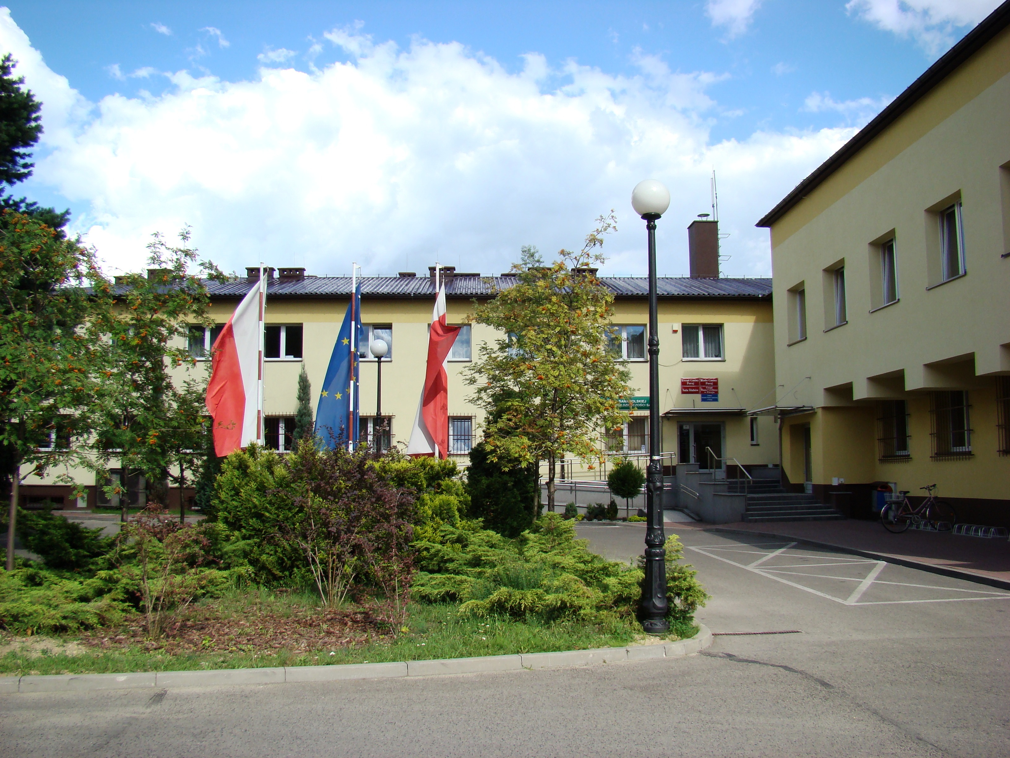 Urząd Gminy w Poraju.